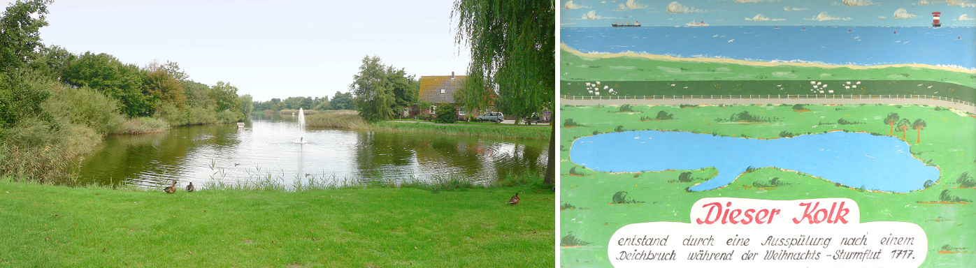 Kolk und erläuterndes Schild in Horumersiel, Schild öffentlich aufgestellt neben dem Kolk